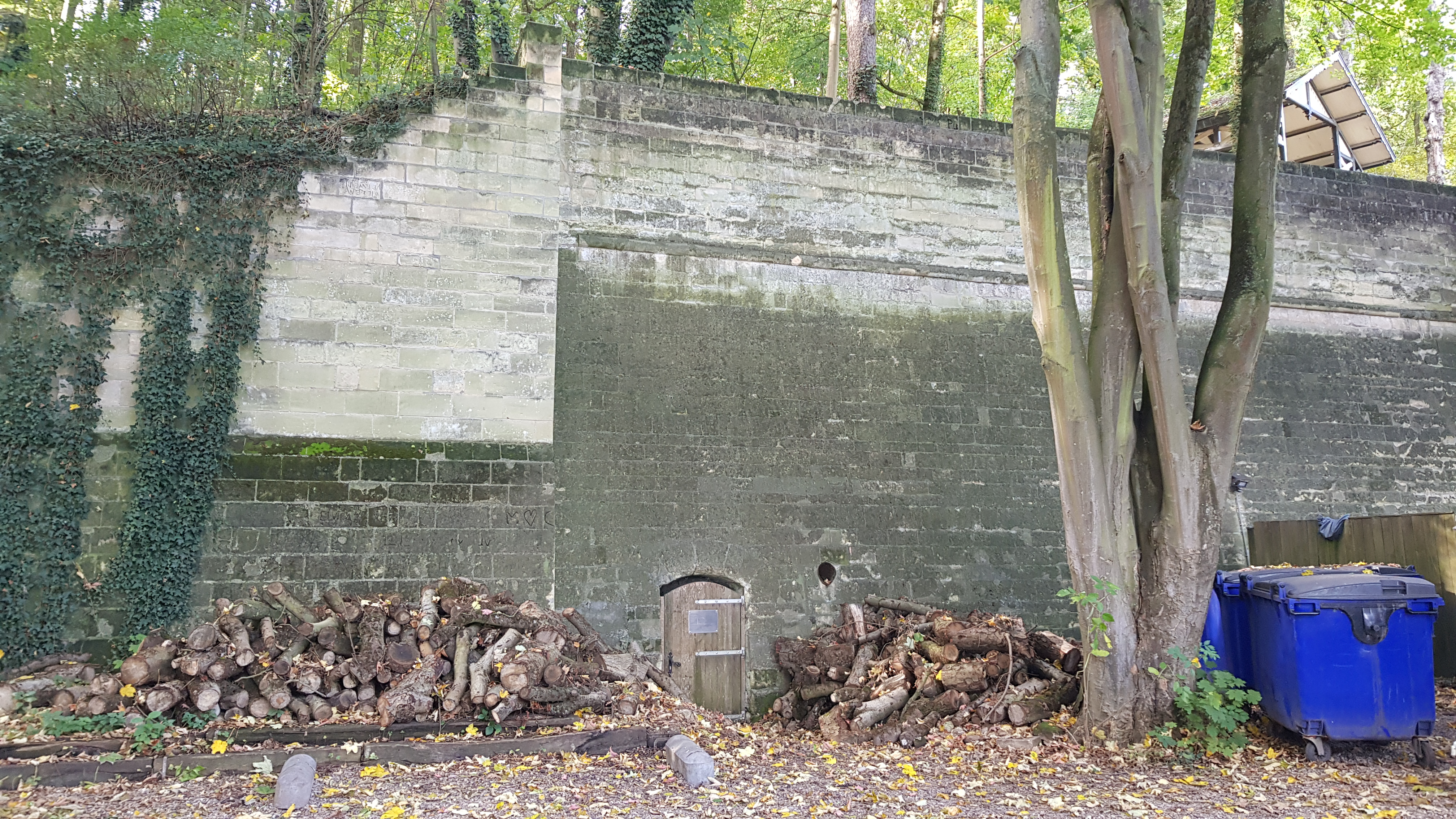 Keldertjes Slavante, Maastricht, Nederland